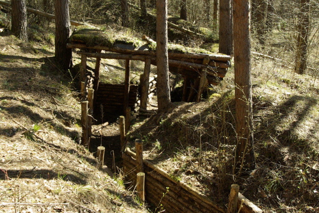 Mummassaares taastatud Rebase pataljoni kaevikud Sinimägede lahingu ajast.